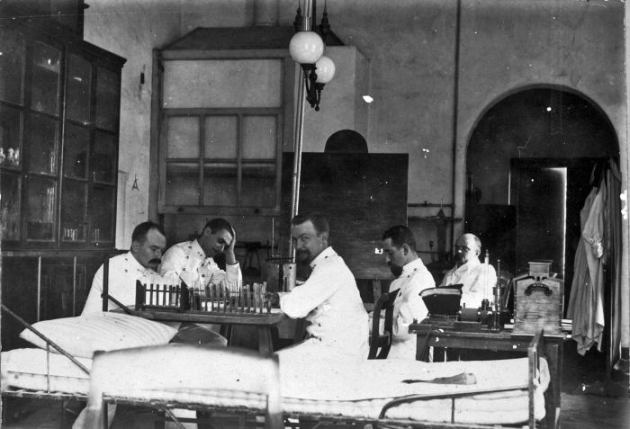 foto. Deelnemers aan een tropencursus voor officieren van gezondheid in het laboratorium van het Militair Hospitaal in Weltevreden